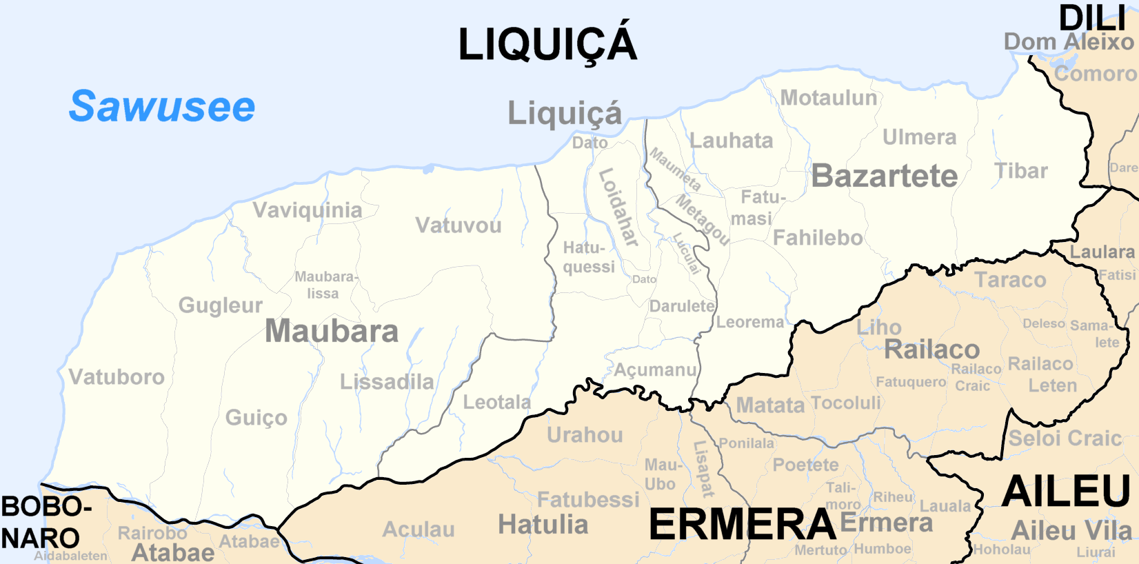 Sucos des Distrikts Liquiçá/Osttimor nach der Neustrukturierung 2004